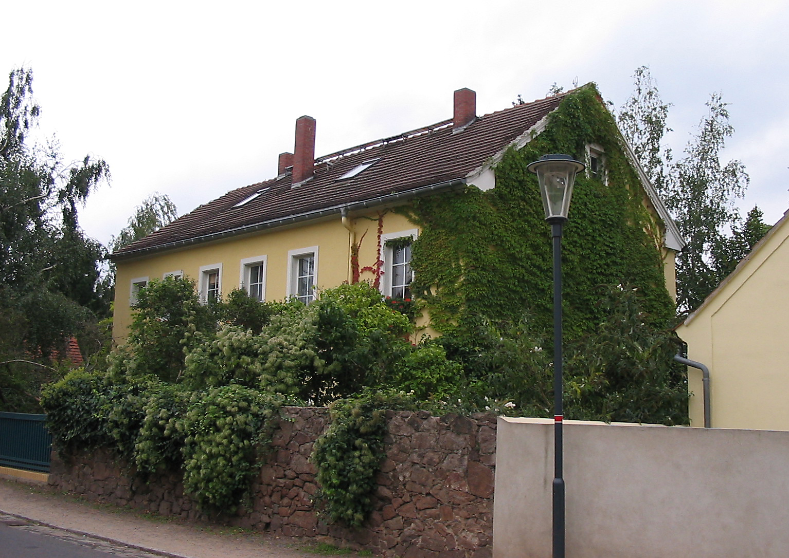 Franz Richard Steches Mops-Haus, Radebeul, 2008